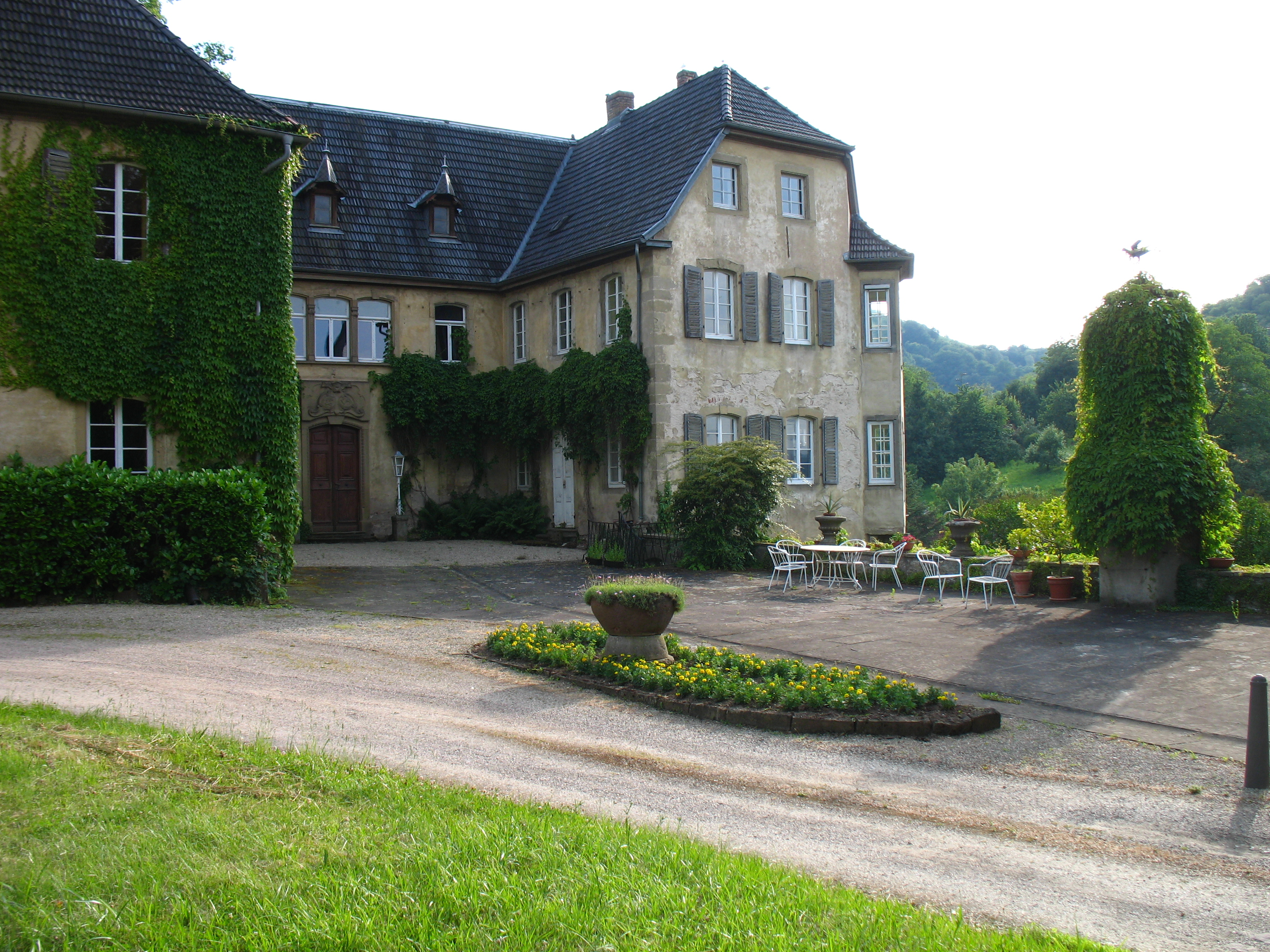 Schloss Hochhausen mit Blick Richtung Westen aufgenommen. Zu sehen ist der Ehrenhof und der nach Norden weisende Eckerker. Rechts steht der von Efeu überwachsene Schornstein der ehemaligen Waschküche, die sich im darunterliegenden Gewölbe befand.